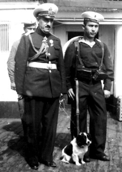 Контраадмирал Асен Тошев - връщане в Балчик и Каварна